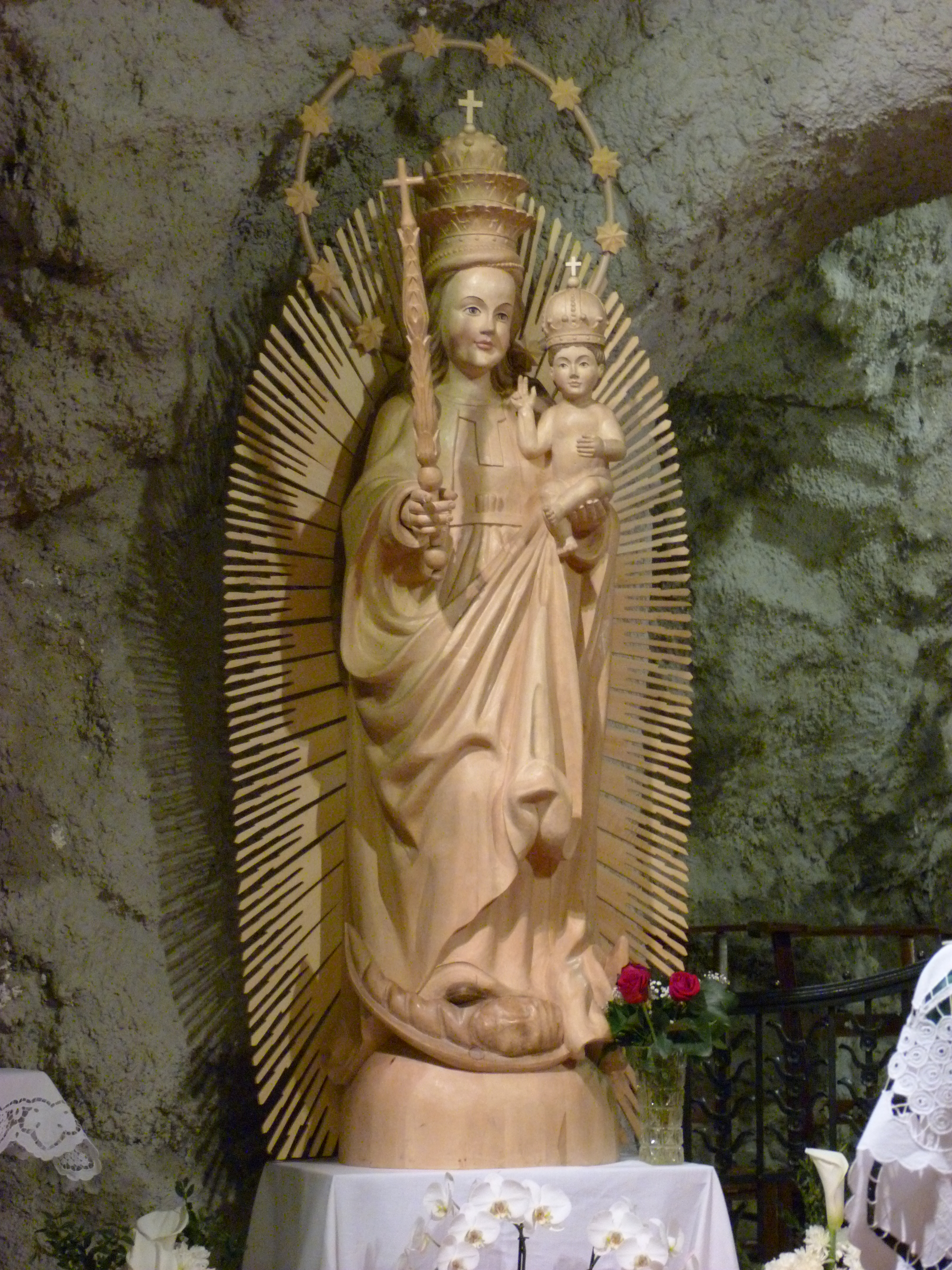 Gellérthegy, a Pálos barlangban. Boldogasszony (Napbaöltözött Boldogasszony), (281,282,288,290,291,294). Boldogasszony 227 cm magas faszobra Csiksomlyón a Kegytemplomban található. A 16 század elején, reneszánsz stílusban készült, hársfából. A világon ismert kegyszobrok közül a legnagyobb. Boldogasszony lába alatt a Hold, fején 12 csillagból álló koszorú. A Pálos barlangban a csíksomlyói Boldogasszony másolata található.